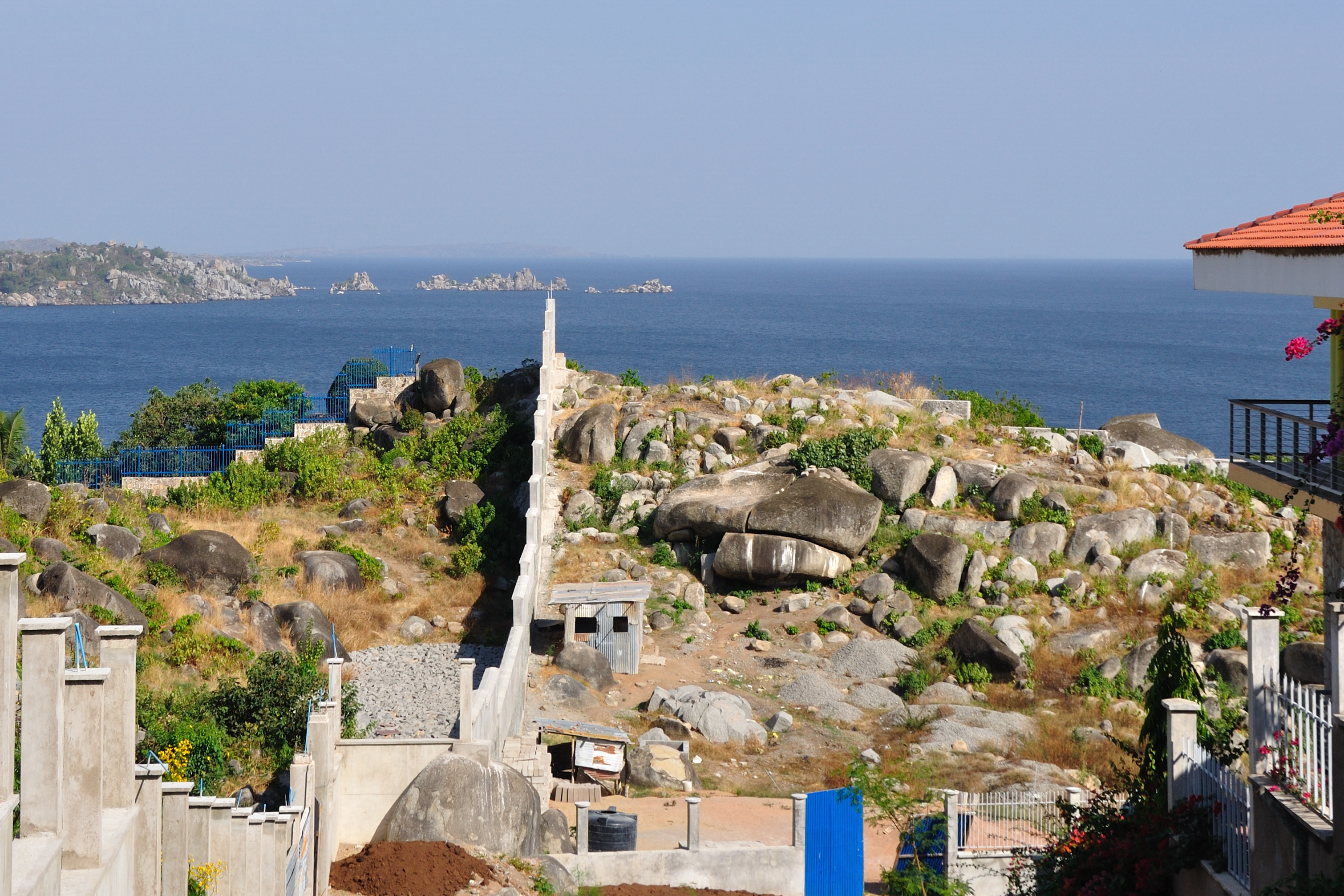 Tanzania, views in Mwanza